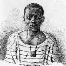 Laptot sarrakholais (matelot indigène) - (illustration de Côte occidentale d'Afrique du Colonel Frey, fig. 58, p. 94)